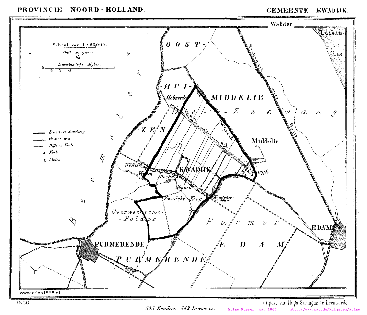 Kaart van Kwadijk uit Gemeente Atlas van Nederland, J. Kuyper 1865-1870, Uitgave Hugo Suringar Leeuwarden.